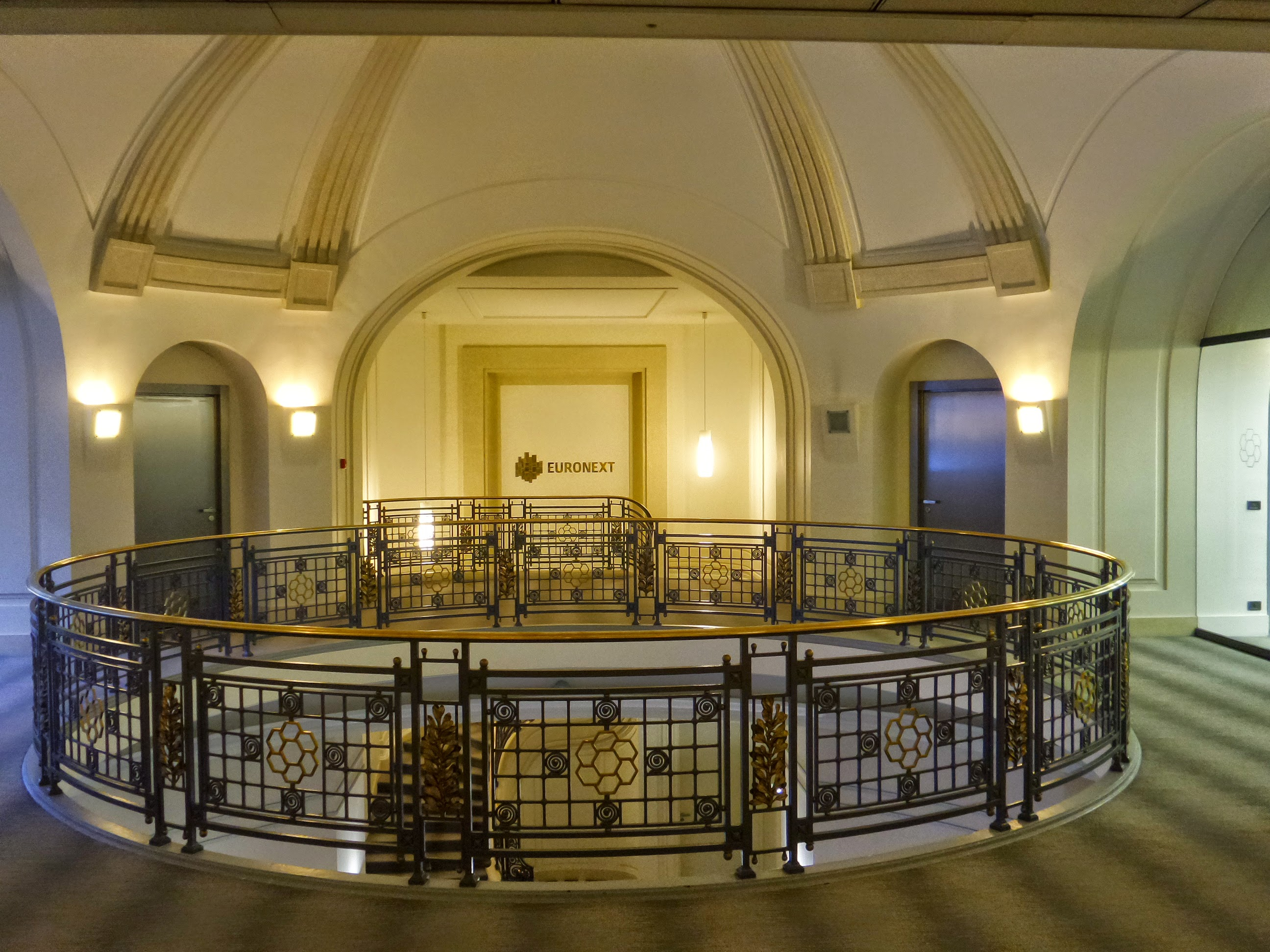 Le 39-41 rue Cambon est un immeuble construit autour d'un patio de 19 000 m² (14 000 m² de bureaux). Ce fut le siège de la Chase Manhattan Bank, puis de la SBF (Société des Bourses Françaises), devenue Euronext. Euronext, locataire de l'immeuble, est parti en juin 2015.